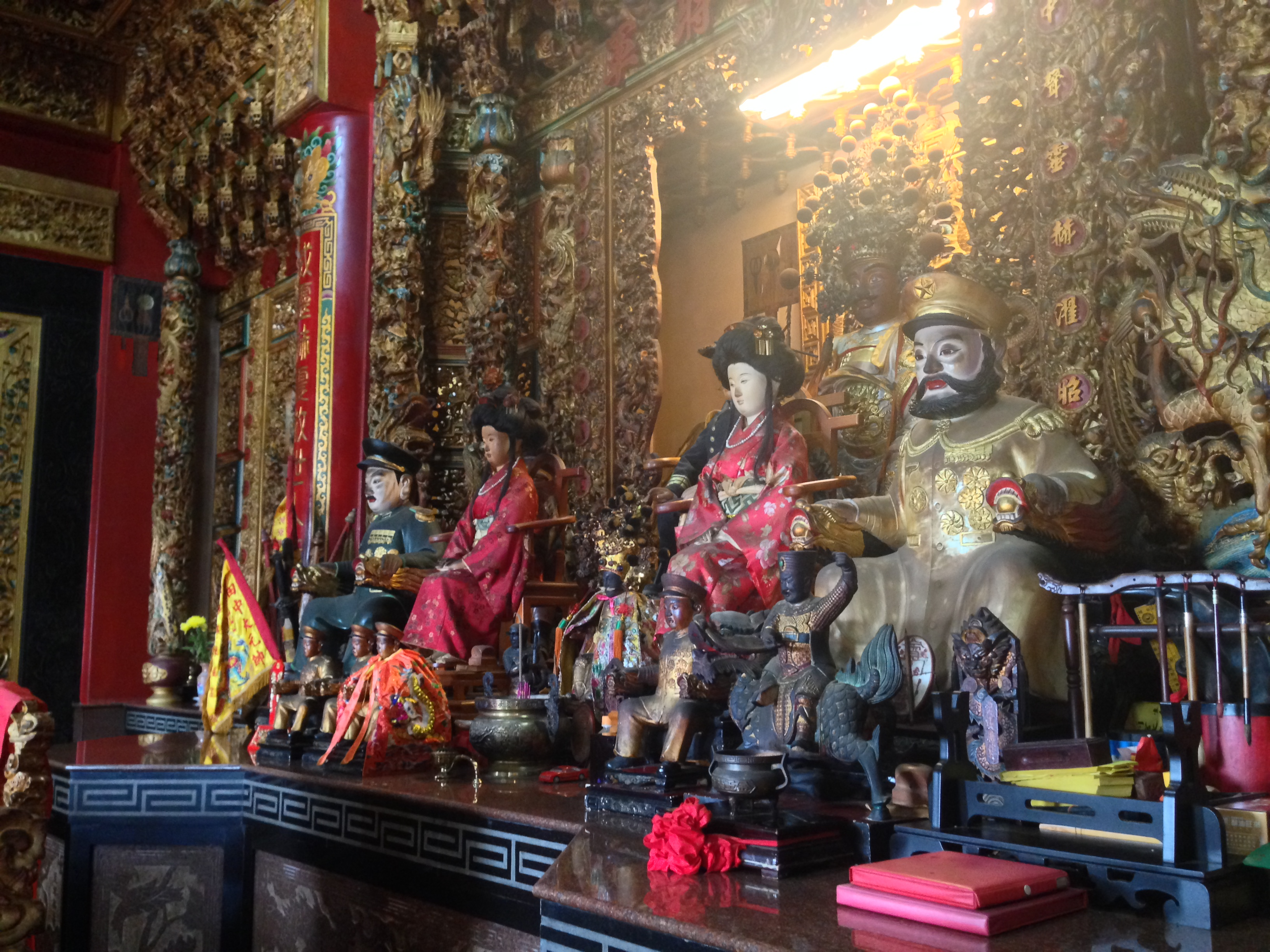 中文（台灣）: 枋寮東龍宮殿內神像斜照